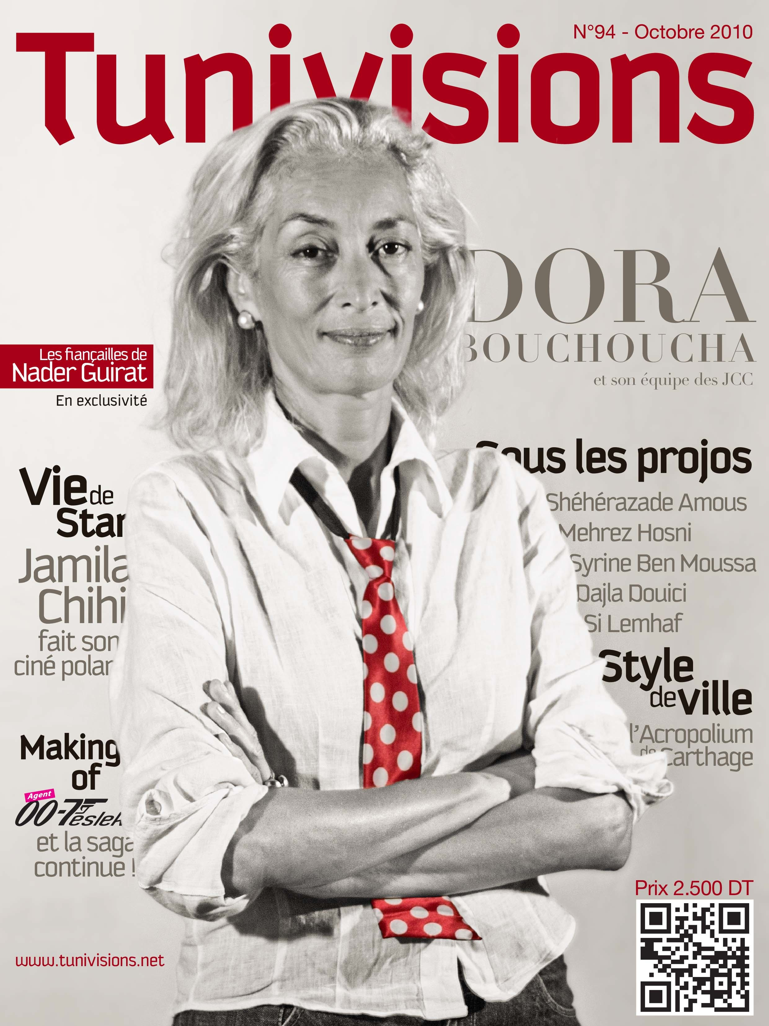 Couverture du numéro 94 du magazine tunisien Tunivisions.